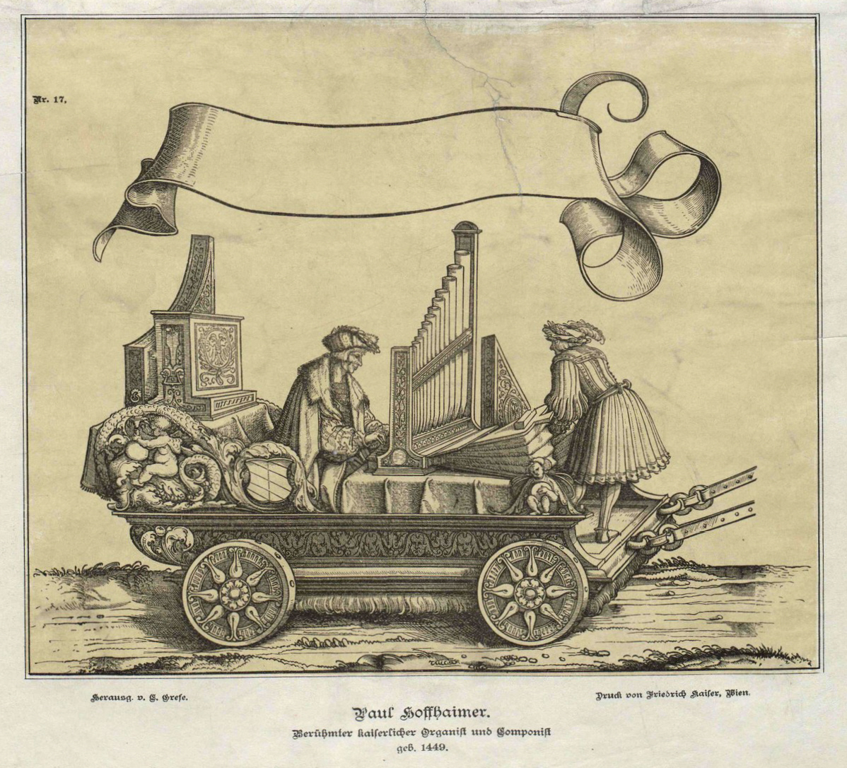 Paul Hoffhaimer. Berühmter kaiserlicher Organist und Componist. Geb. 1449. Hrsg. von G. Grefe. Druck von Friedrich Kaiser, Wien.